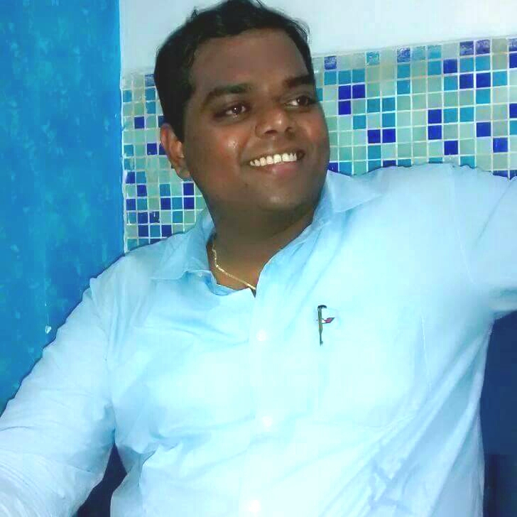 Photo of Marathi Poet Vaibhav Chayya